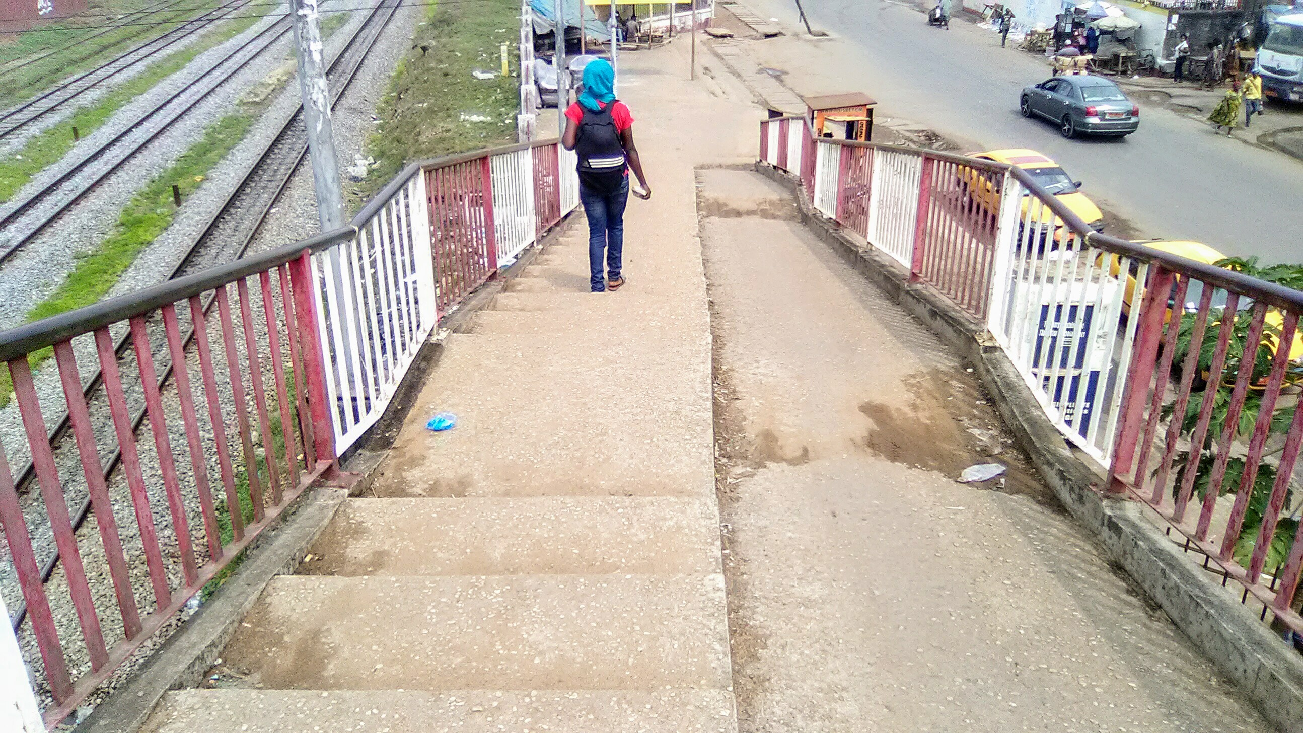 Les handicapés se déplaçant par les fauteuils roulants sont désormais pris en compte dans l'aménagement des voies d'accès à certains endroits. This is an image with the theme "Africa on the Move or Transport" from: Cameroon